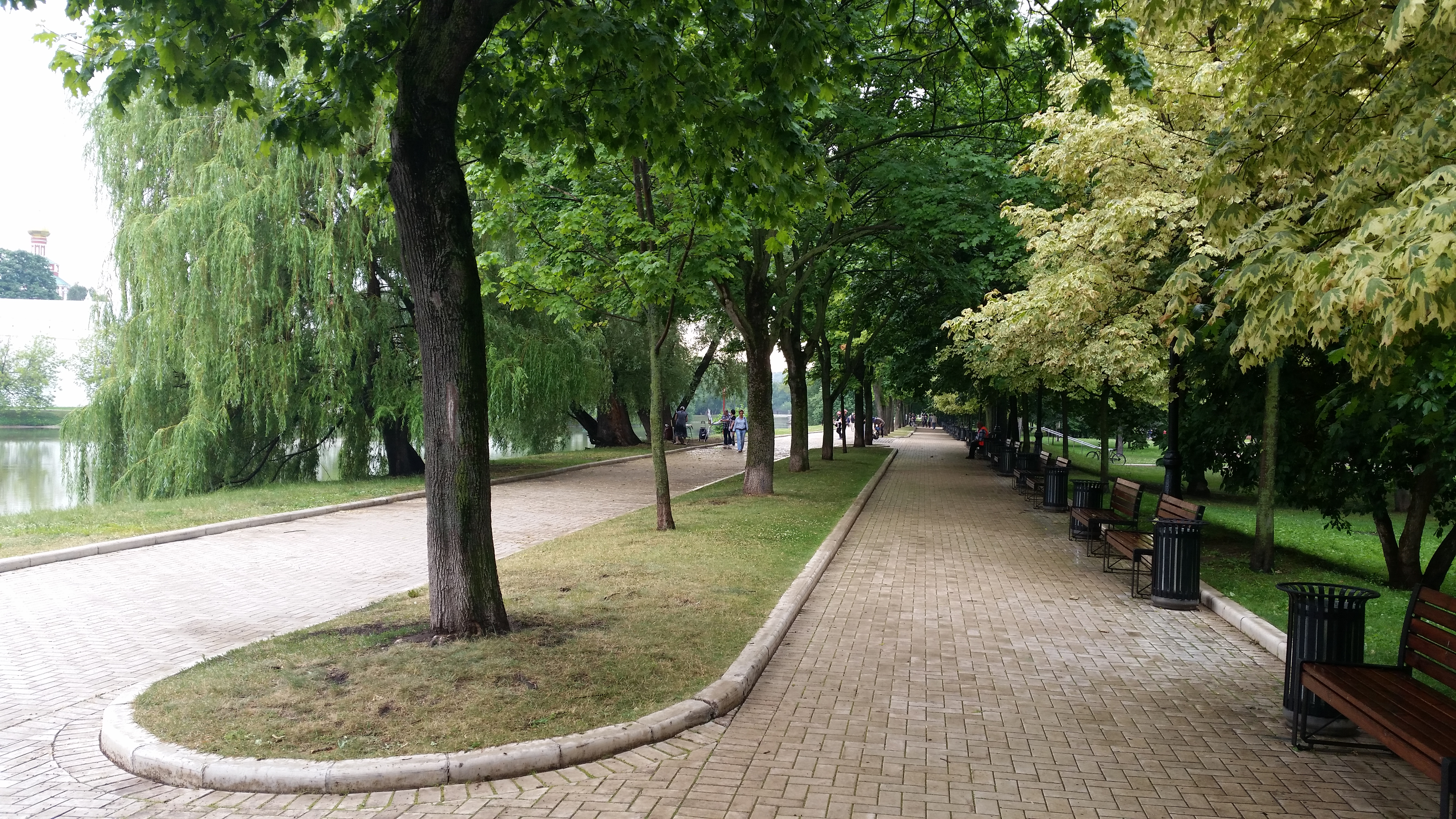 Парк Новодевичьи пруды. Вид в сторону улицы Хамовнический Вал. Слева располагается Большой Новодевичий пруд.